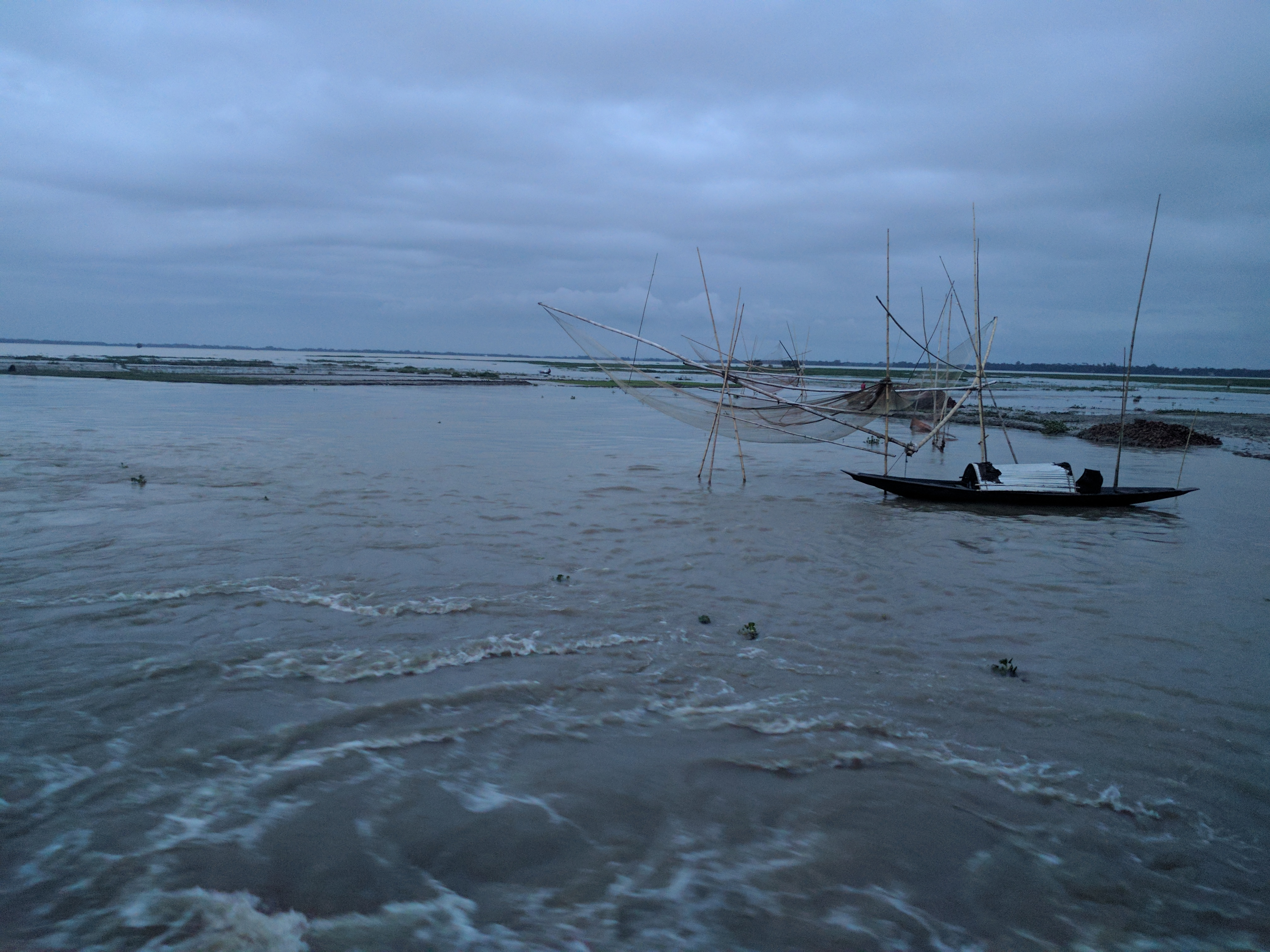 শনির হাওর সিলেটের সুনামগঞ্জ জেলায় অবস্থিত একটি বড় হাওর।